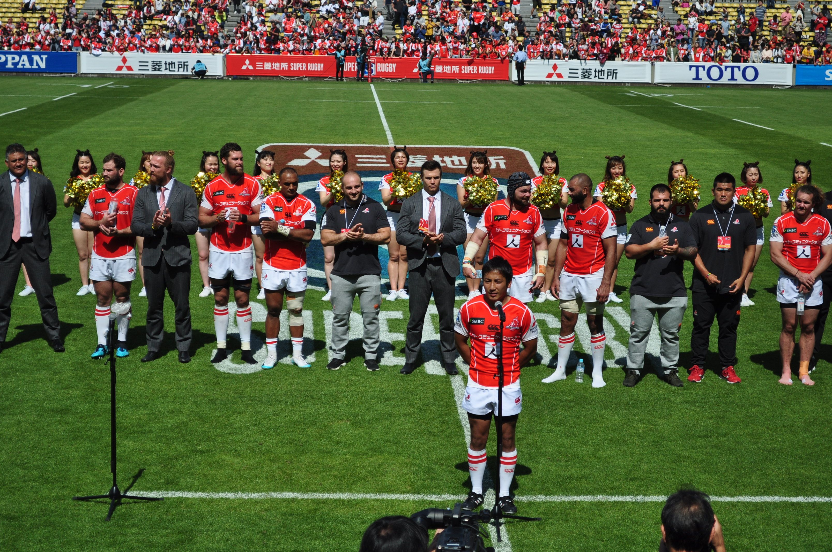 サンウルブズ vs レッズ